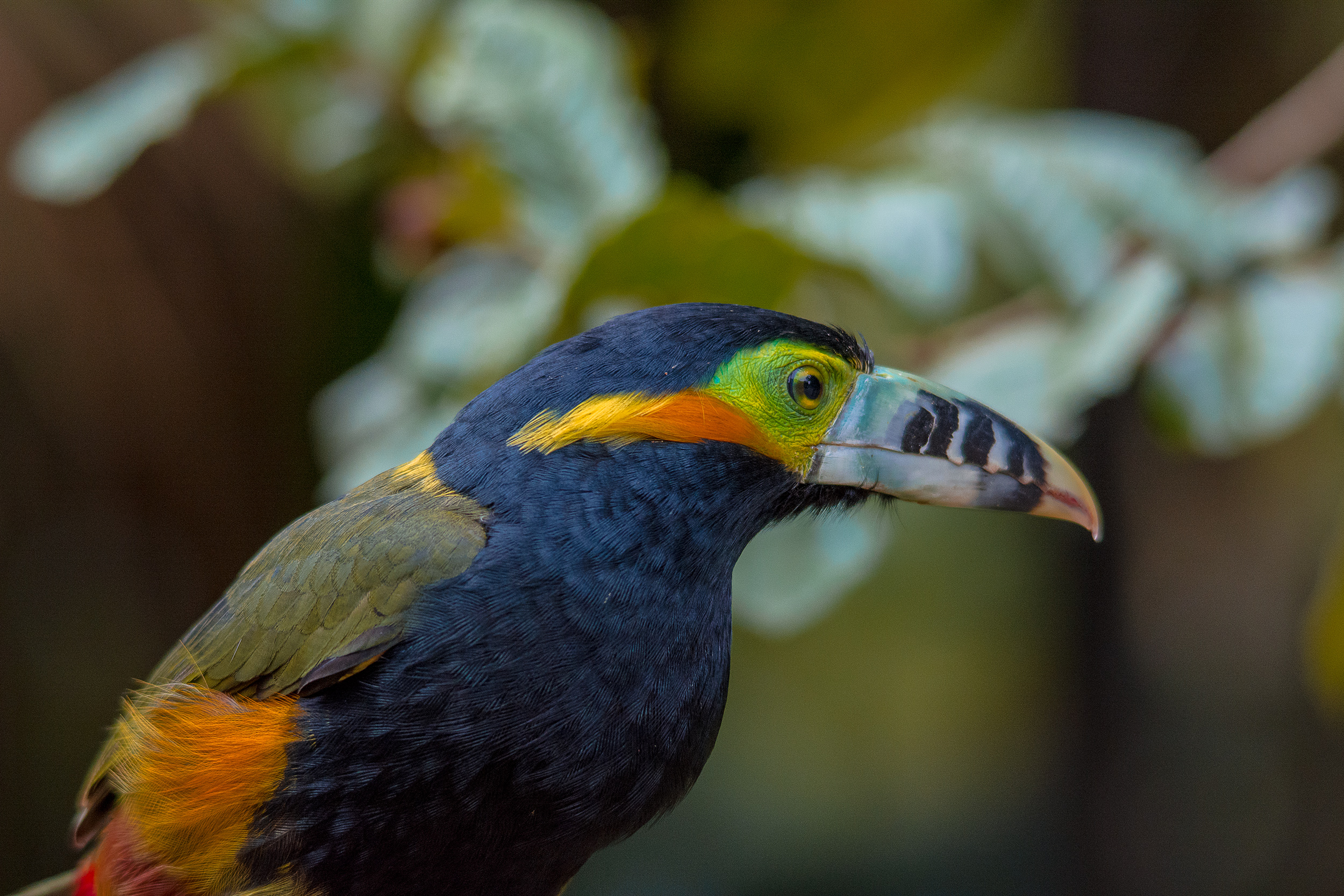 Registro efetuado em Tapitaí-SP, na trilha dos Tucanos. Bioma: Mata Atlântica. Nome Científico: Selenidera maculirostris. Nome Inglês:Spot-billed Toucanet.Habita florestas de Mata Atlântica. É encontrado na Bahia, Minas Gerais, Rio Grande do Sul, São Paulo, Argentina e Paraguai. Alimenta-se basicamente de frutos, porém, predam ovos e filhotes de outras espécies. Em relação à risco de extinção, considerado como pouco preocupante.